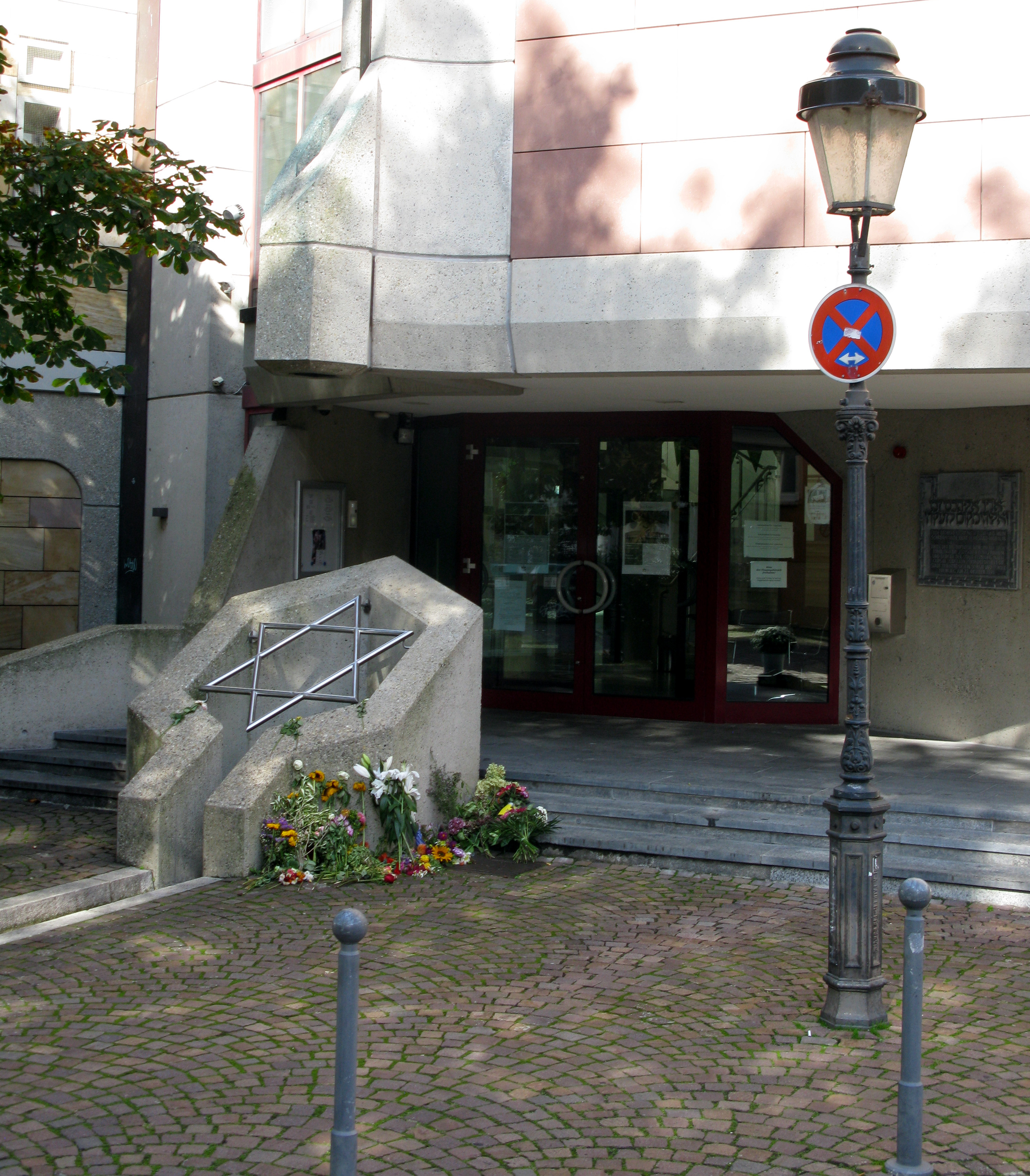 Blumen vor der Freiburger Synagoge anlässlich eines antisemitischen Anschlags in Halle am 9. Oktober 2019